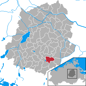 Wildberg, Landkreis Demmin, Mecklenburg-Vorpommern